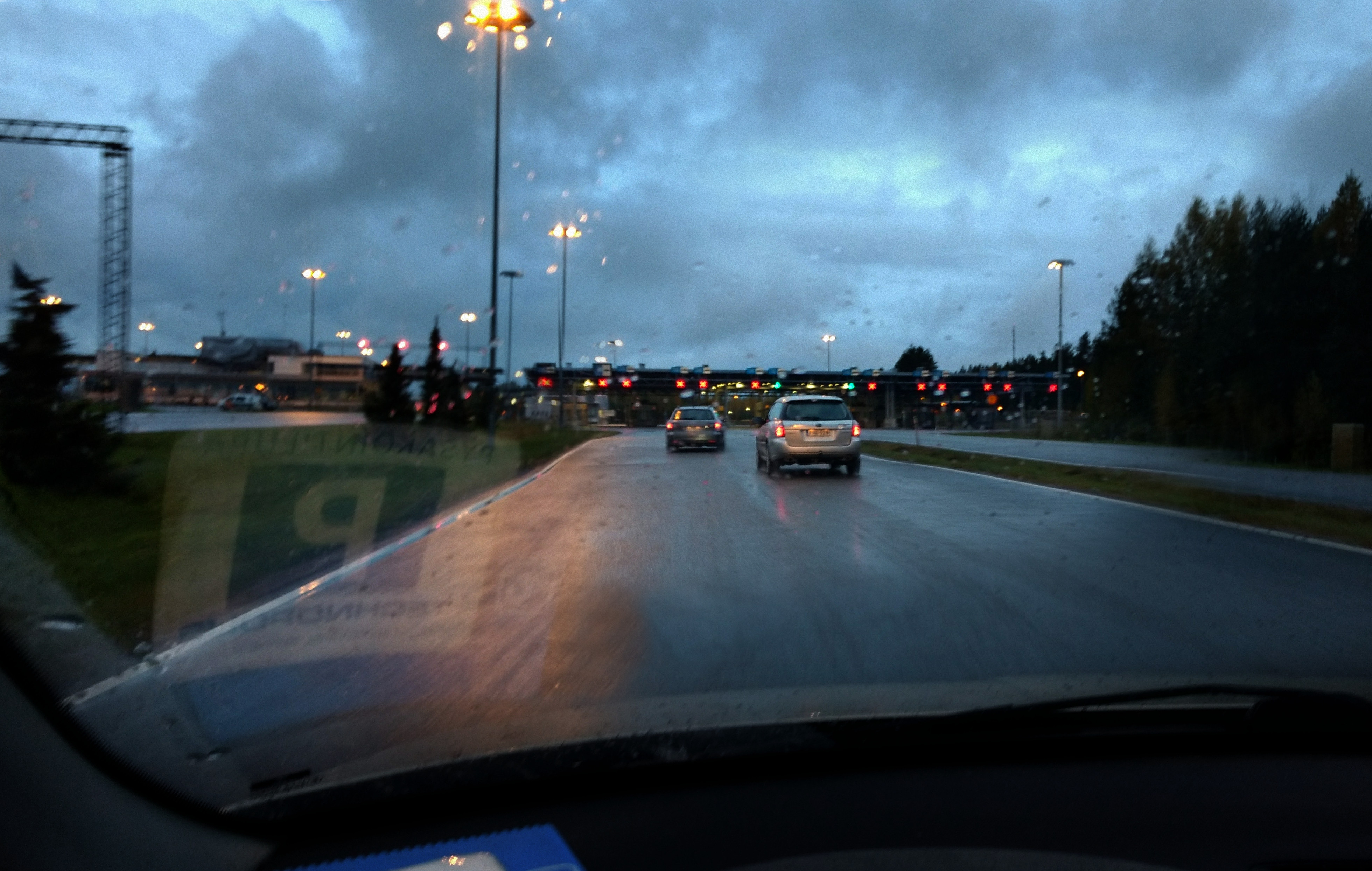 Vaalimaan rajanylitysasema Venäjältä saapuessa